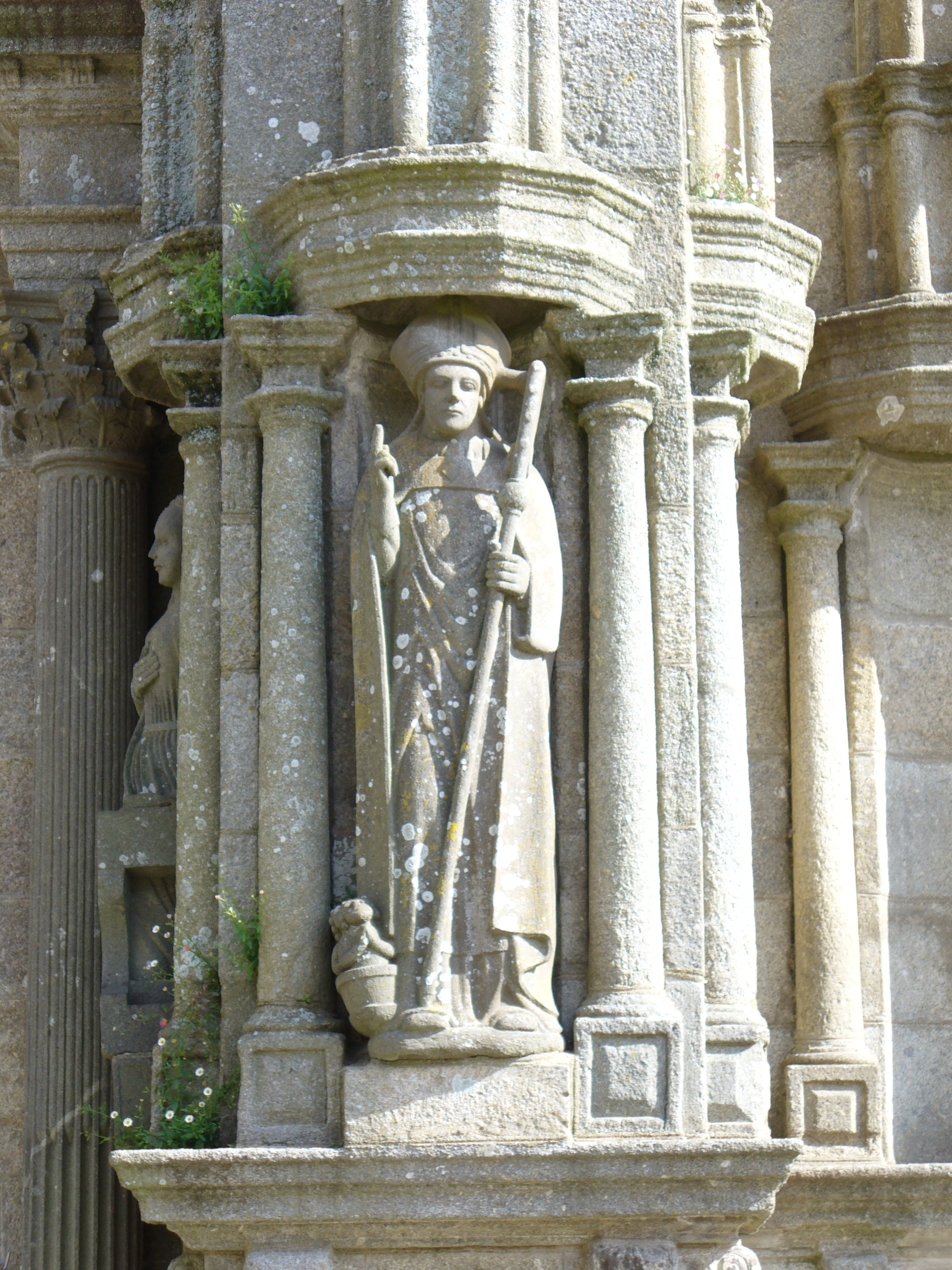 Eglise Notre Dame de Saint (16.-18.Jh.)Thegonnec im Renaissancestil-Umfriedeter Pfarrbezirk(enclos Paroissial)-Departement Finistere-Region Bretagne.